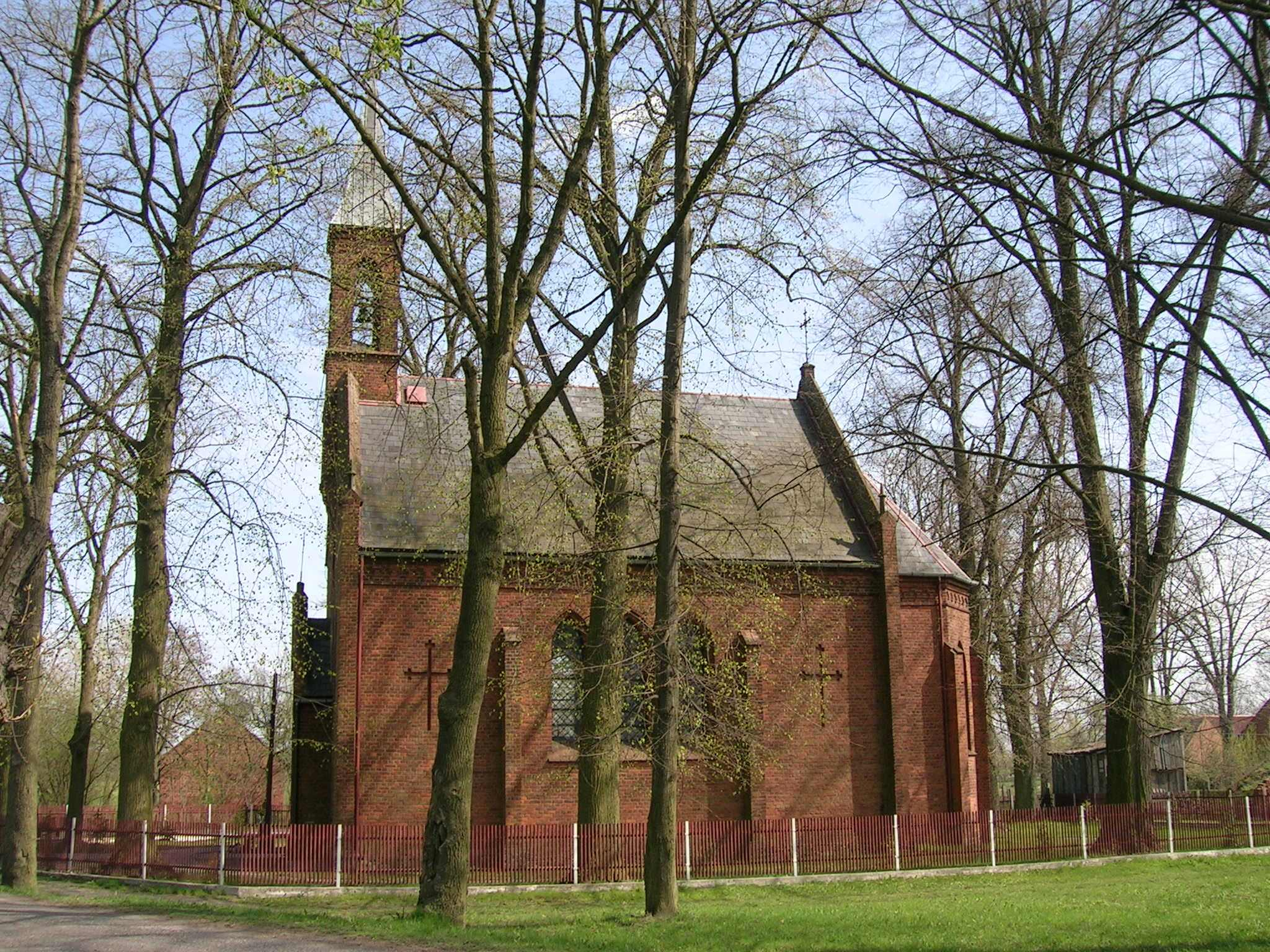 Kościół św. Stanisława Kostki w Ciecierzynie